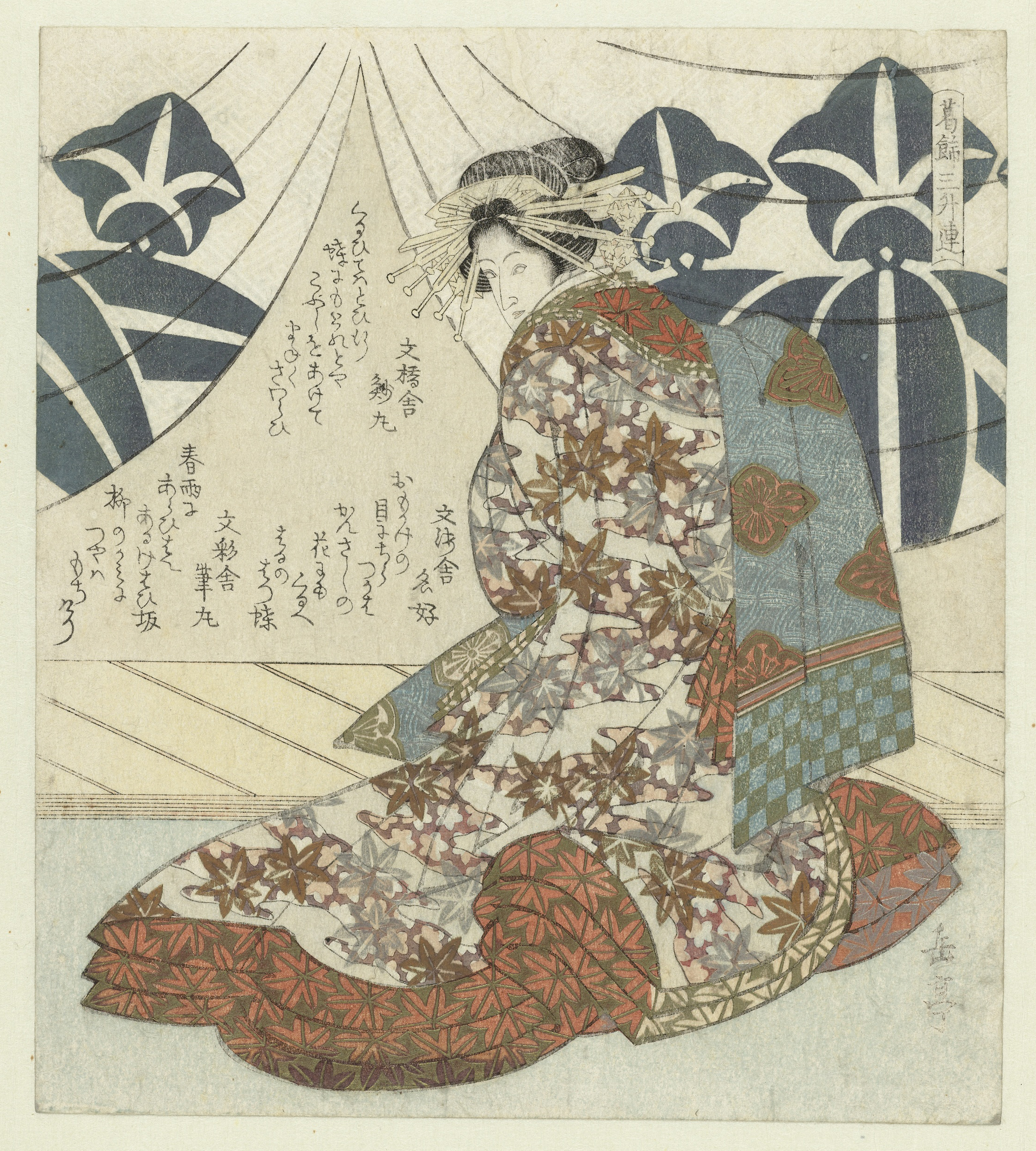 De acteur Ichikawa Monnosuke III (1794-1824) in de rol van de courtisane Kewaizaka no Shôshô, de minnares van Soga no Gorô Tokimune, gekleed in talloze kledingstukken gedecoreerd met ahornbladeren. Met drie gedichten, vierde blad van een vijfluik. Label Line: mentioned on object Yashima Gakutei (1786 - 1868), 1823, kleurenhoutsnede; blinddruk; lijnblok in zwart met kleurblokken; metaalpigmenten Collection: prenten; Japan (collectie)